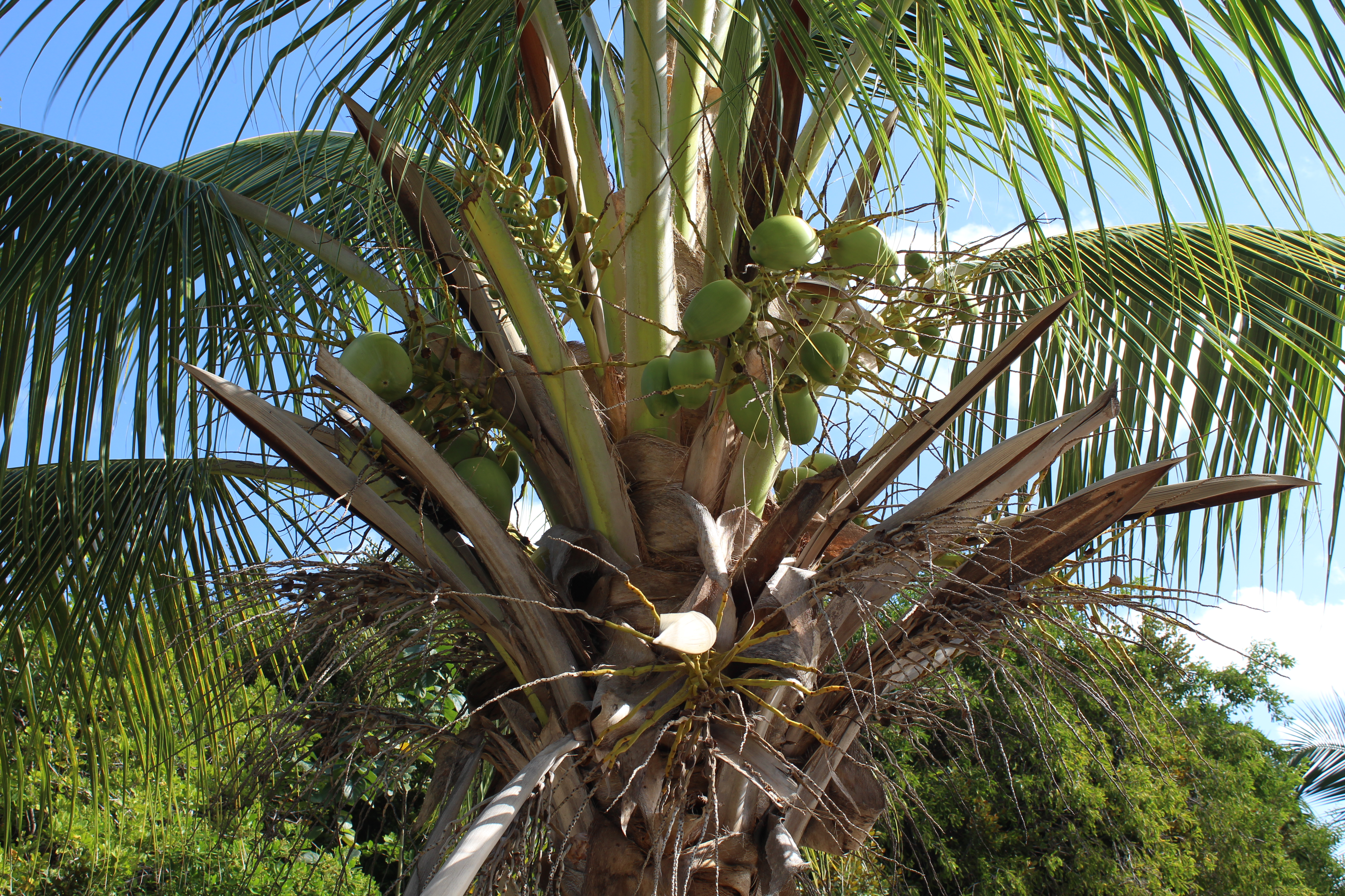 Cocotier avec noix de coco à différent stade de maturation